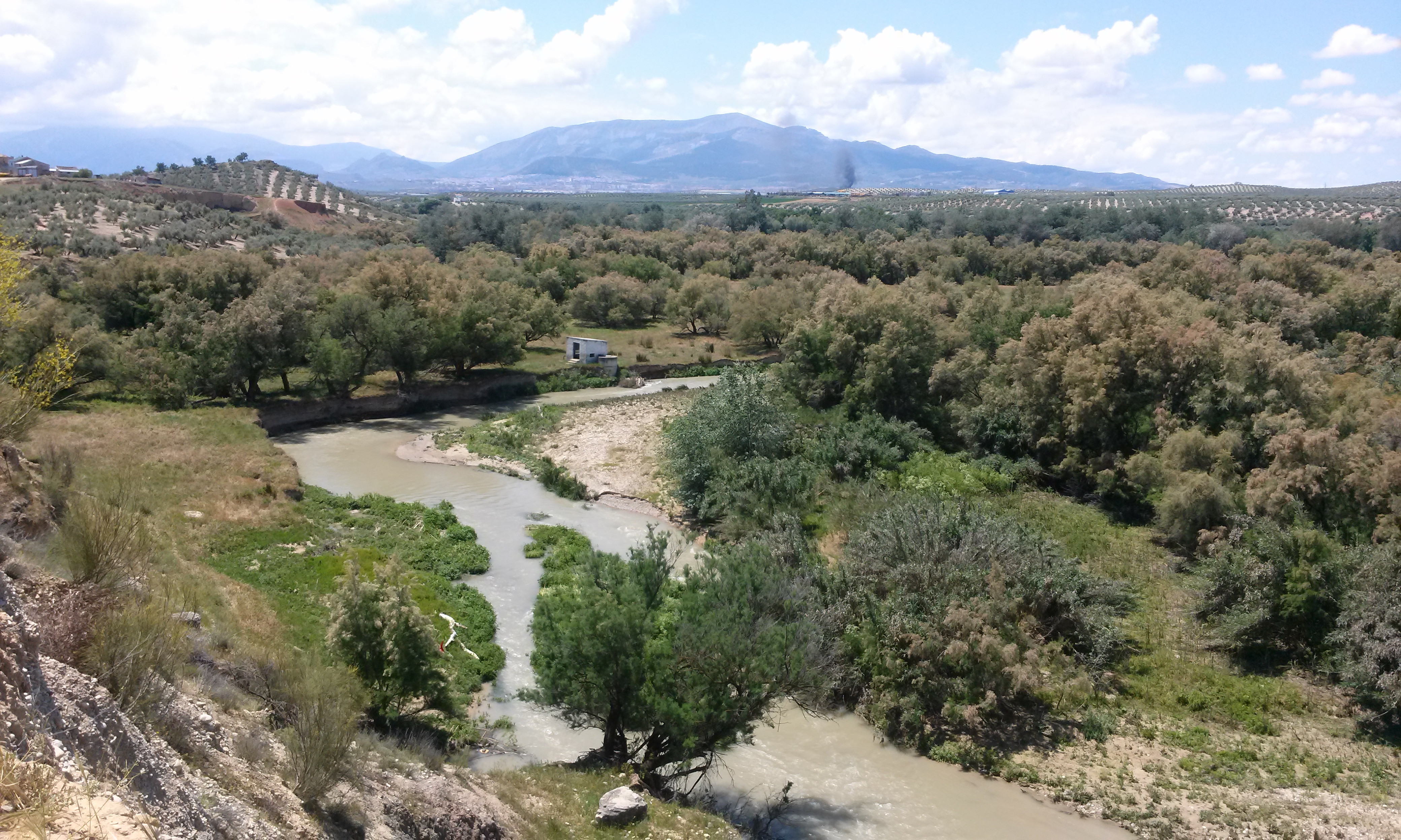 El río Guadalbullón, a la altura de Grañena y el cortijo Las Torrecillas, en el paraje El Torrejón, al norte del término municipal de Jaén.